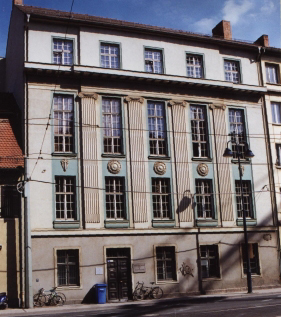 Gebäude des Bereichs für Ur- und Frühgeschichte der Universität Jena